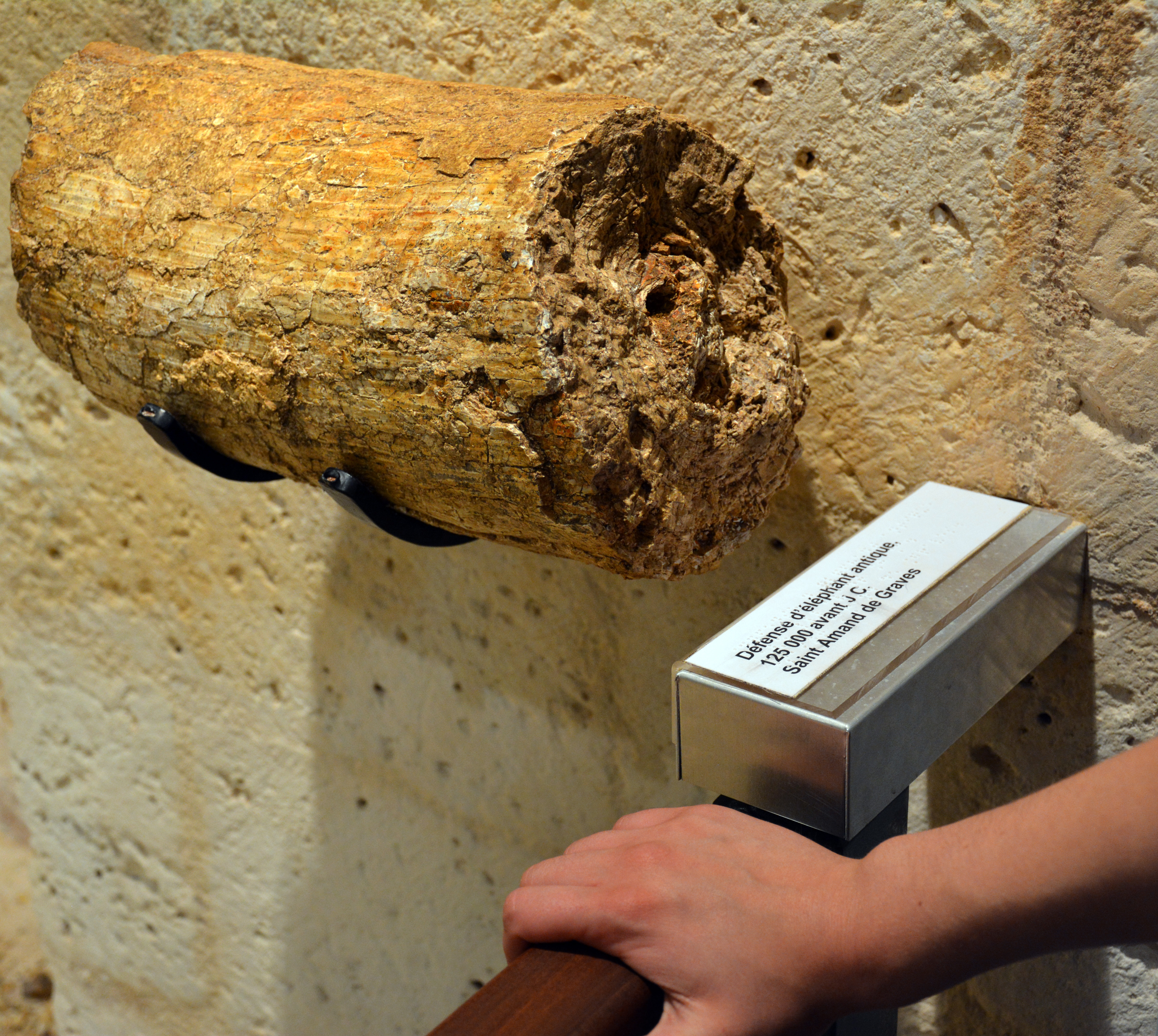 Morceau de défense d'un éléphant antique (environ 125 000 ans avant Jésus-Christ) conservé au Musée d'Angoulême. La main qui donne l'échelle est celle d'une adulte. Origine : Saint Amand de Graves (aujourd'hui intégré à Graves-Saint-Amant